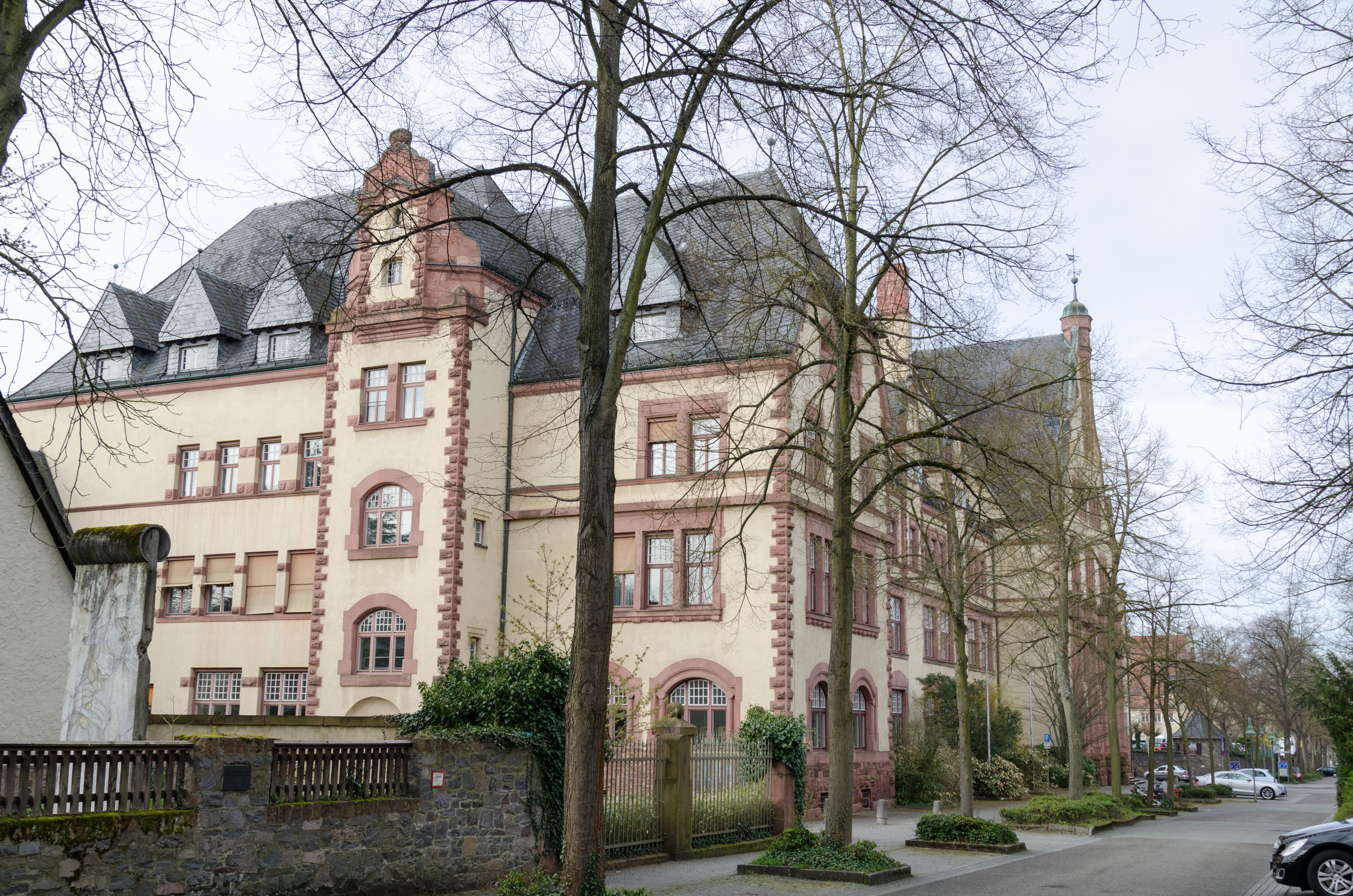 Aschaffenburg, Grünewaldstraße 18, Dalberg Gymnasium